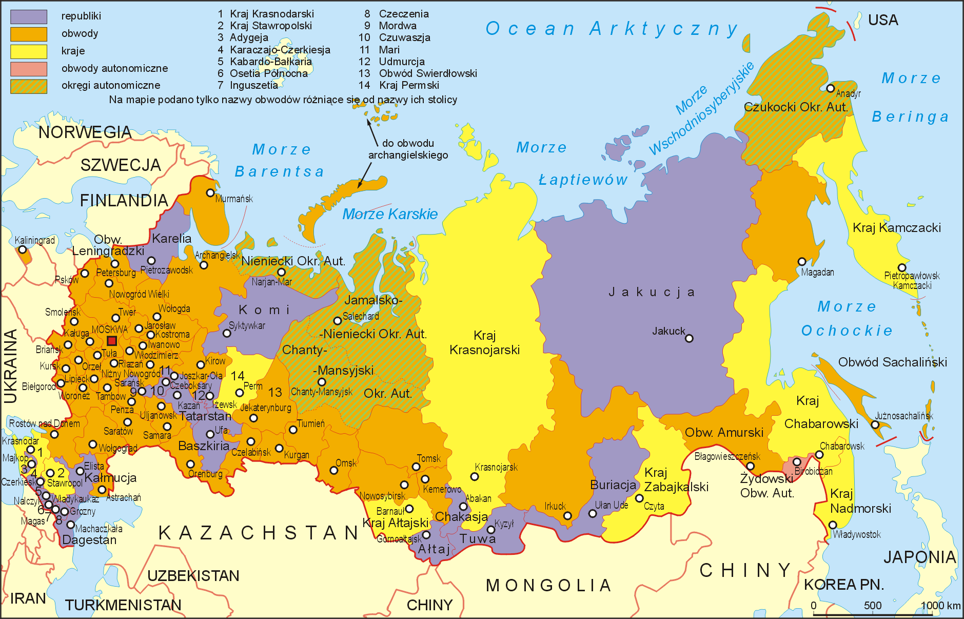 Mapa podziału administracyjnego Rosji obowiązującego od 1 marca 2008.